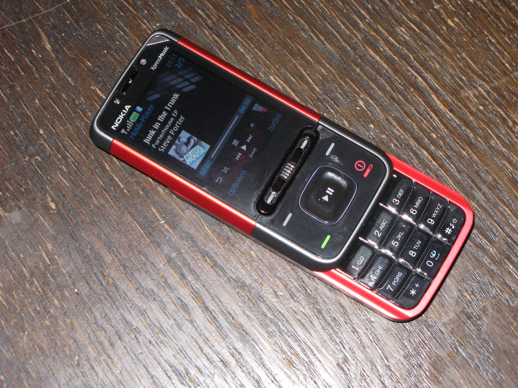 Nokia 5610 XpressMusic mit laufenden Musik-Player